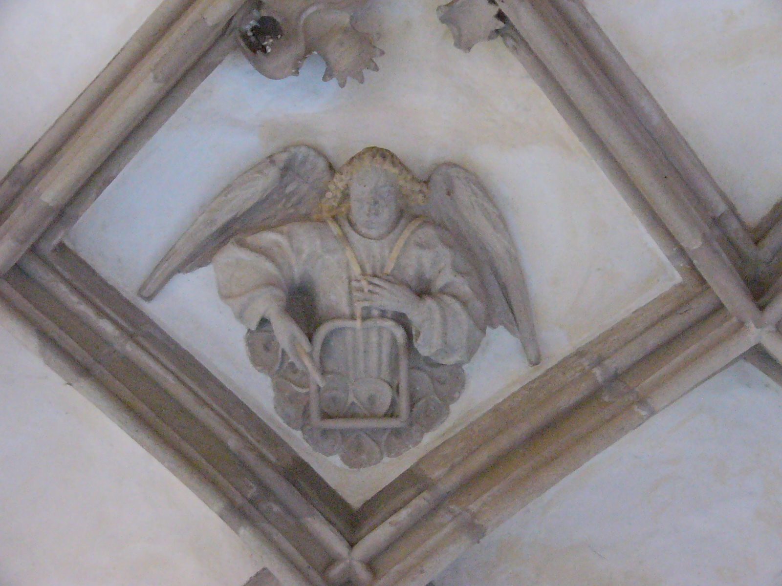 Musizierende Engel im Gewölbe des Himmelkroner Kreuzgangs